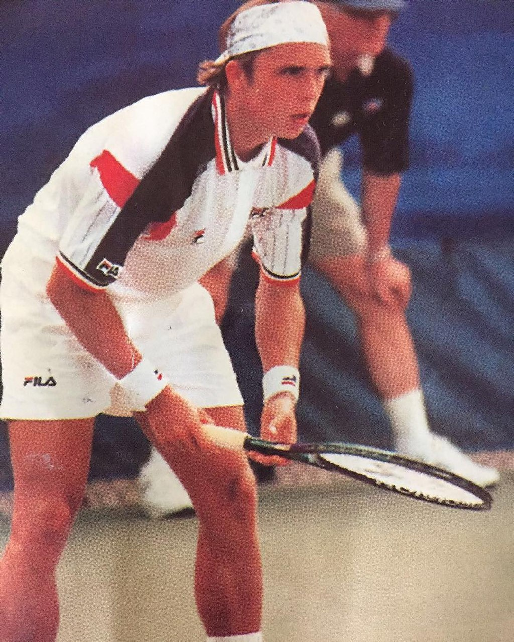 Jimy Szymanski en el Miami Open de 1993